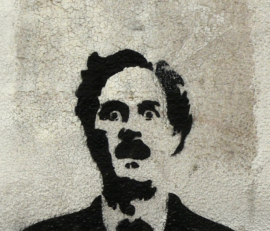 Versión recortada. Graffiti de John Cleese en Lisboa.